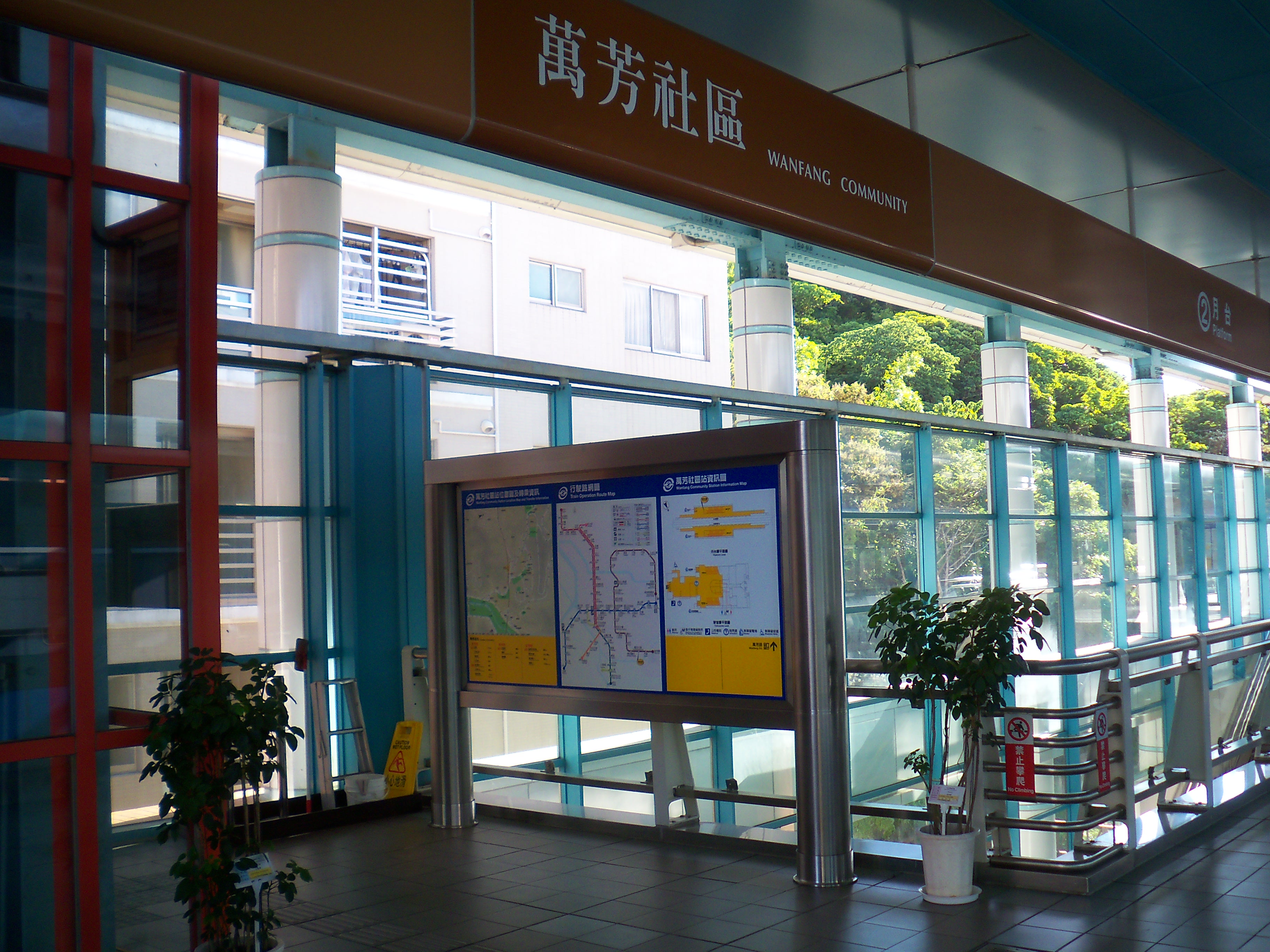 台北捷運文山線萬芳社区駅ホームの案内板。